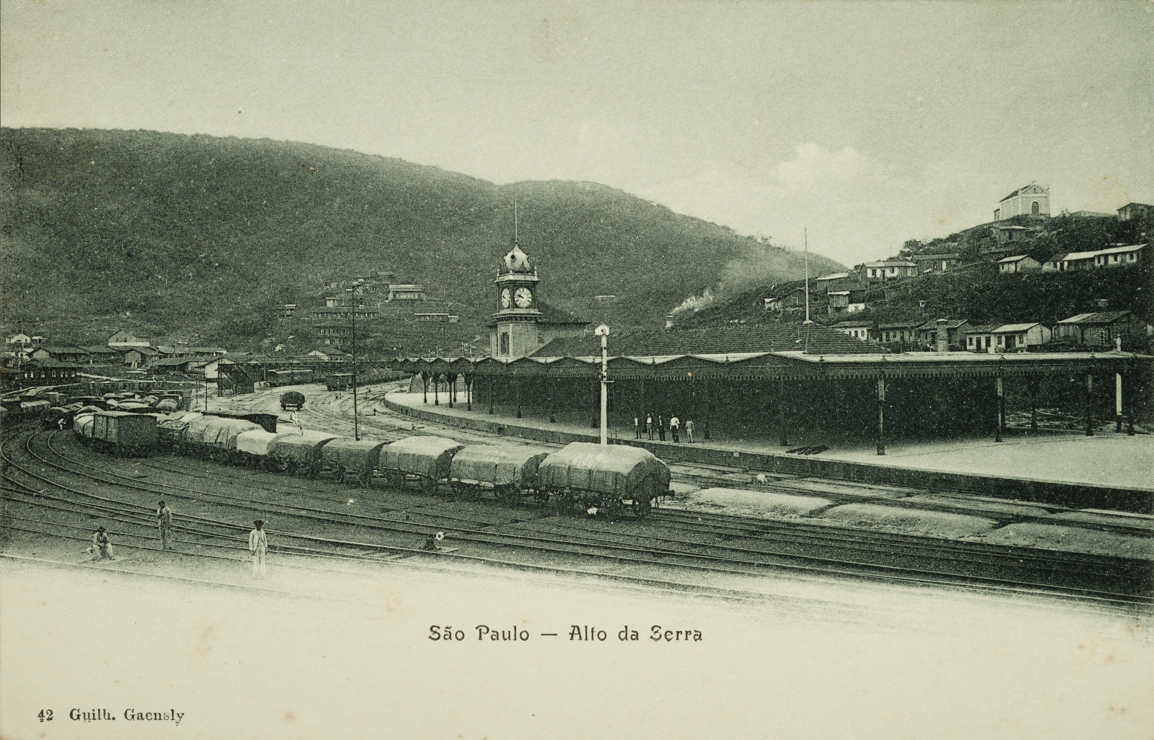 Obra que integra o acervo do Museu Paulista da USP.